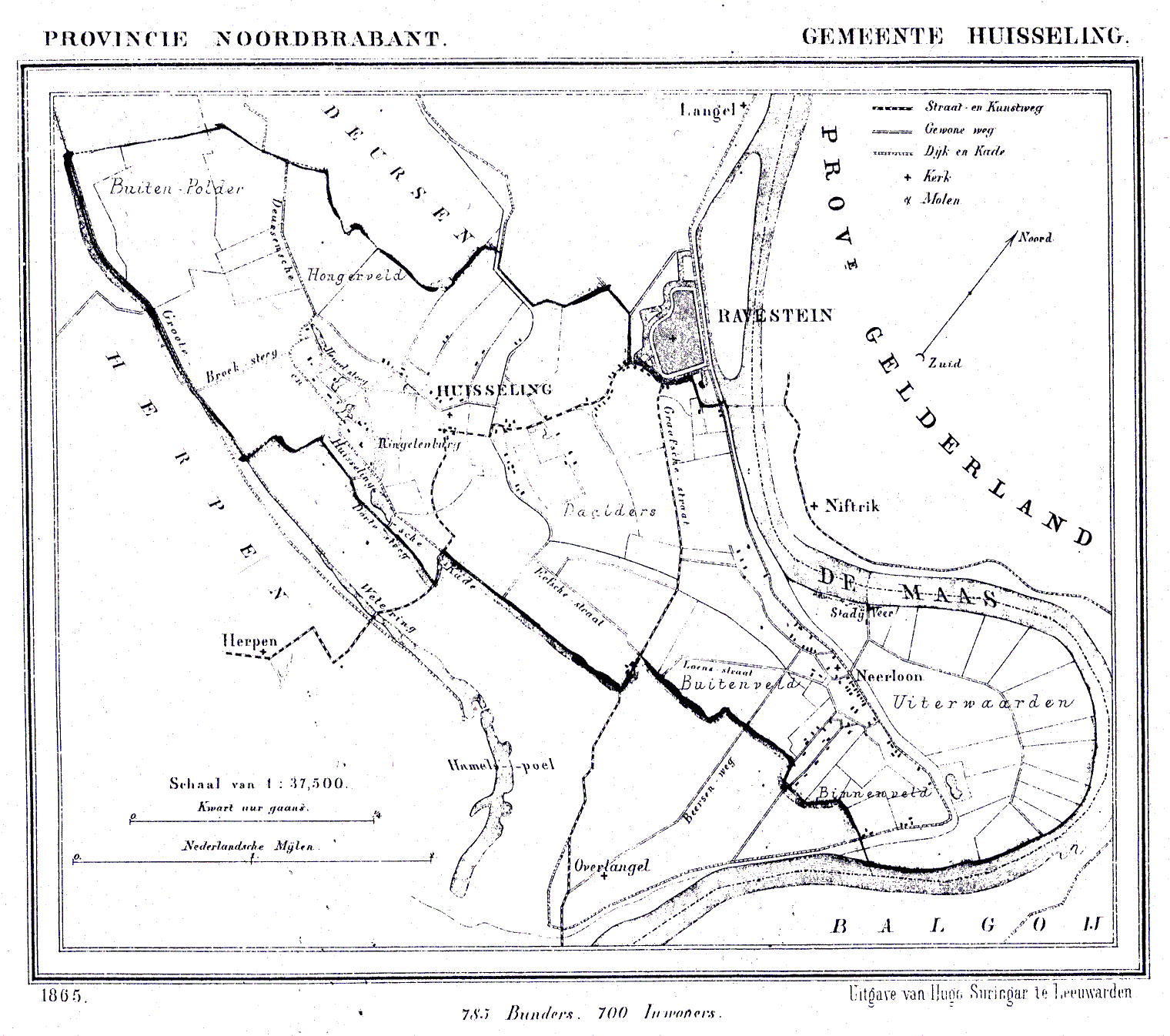 Nederland, Noord-Brabant, Gemeente Huisseling